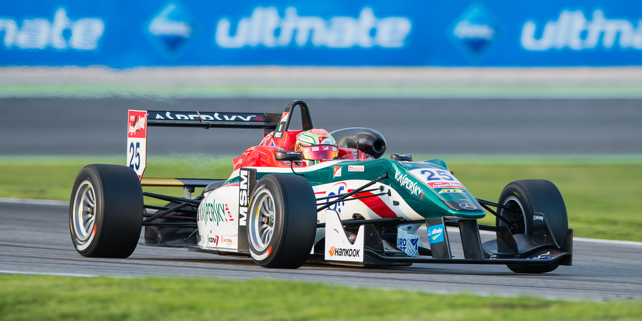 Antonio Fuoco,DTM,Dallara F312,Deutsche Tourenwagen Masters,F3 FIA European Championship,FIA Formel 3 Europameisterschaft,Hockenheimring,Mercedes-Benz,Motorsport,Prema Powerteam